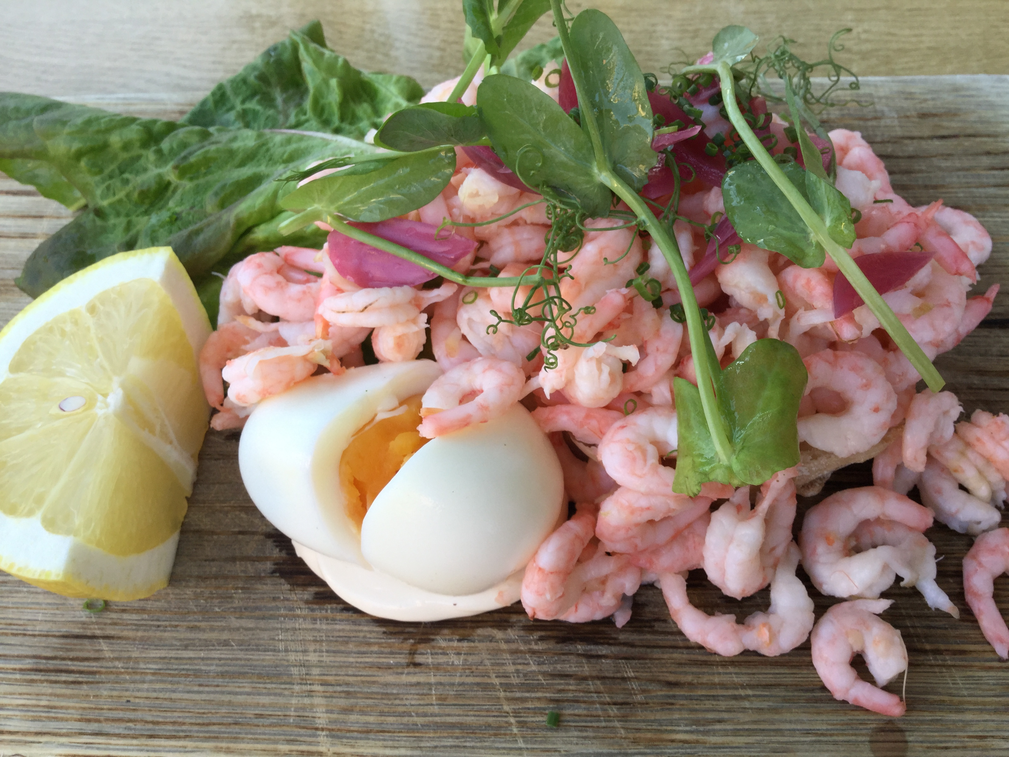 Räksmörgås på Vimmerby stadshotell, maj 2017